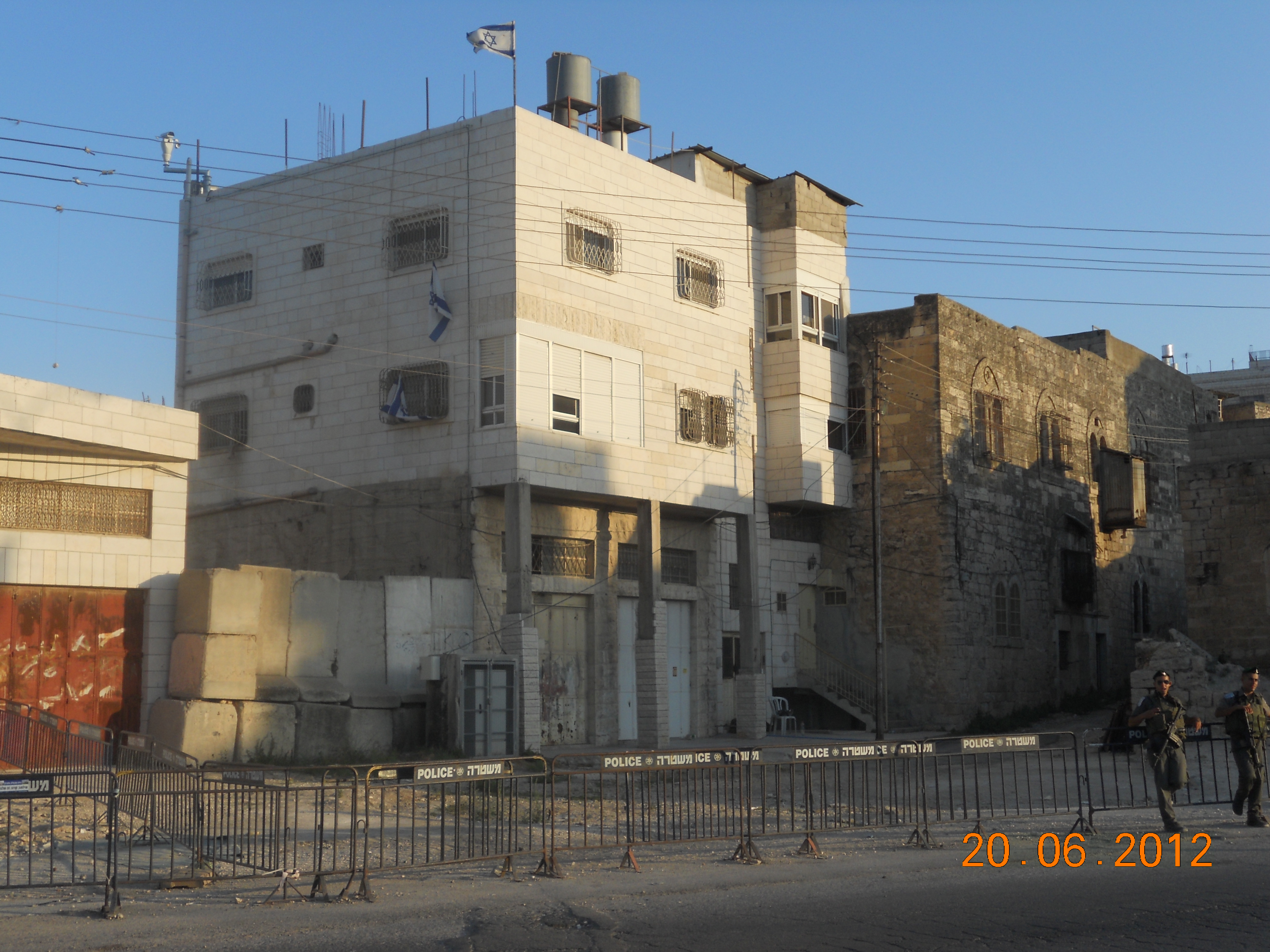 בית המכפלה בחברון